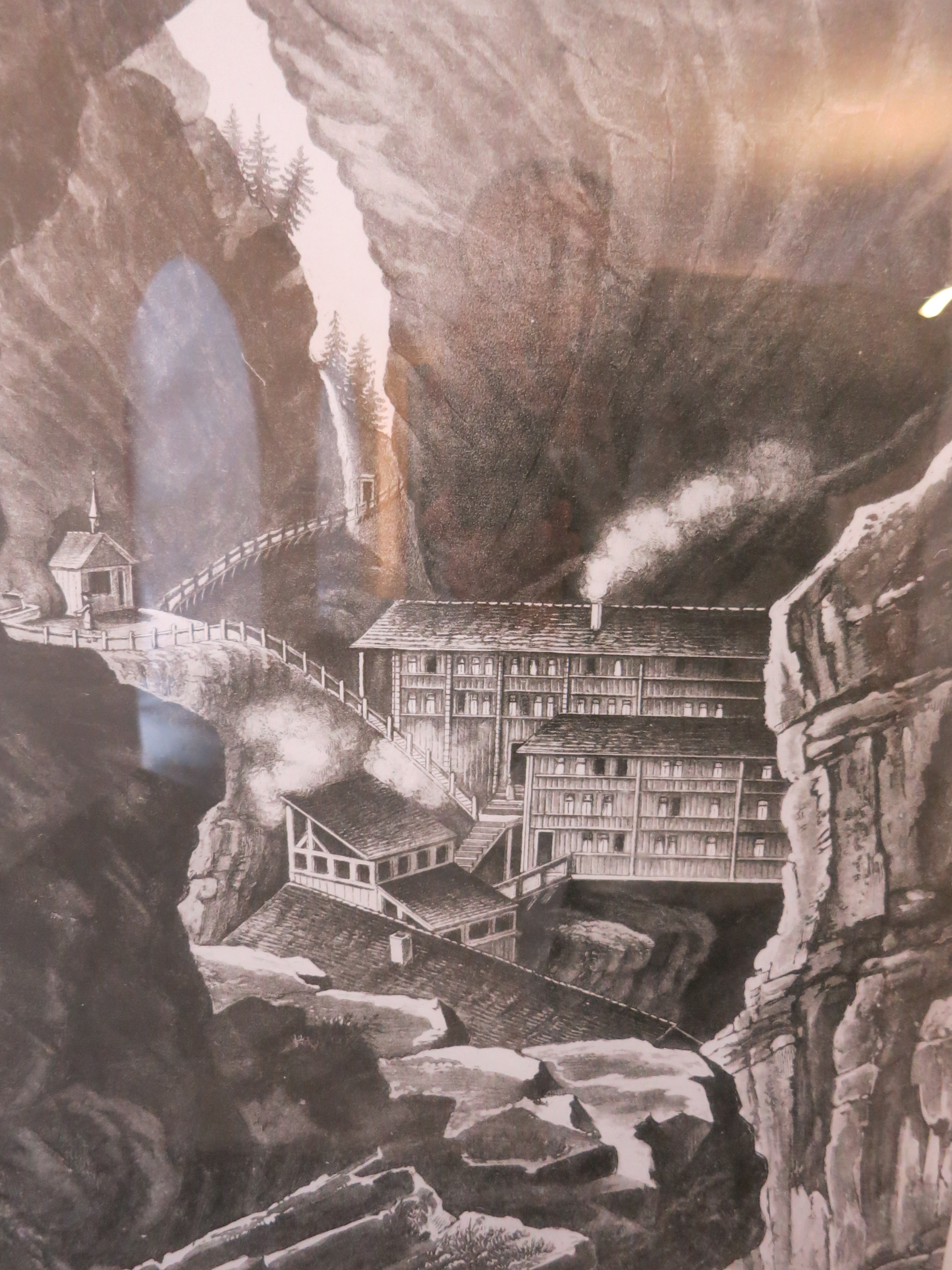 Altes Bad Pfäfers, Bad Ragaz SG, Schweiz